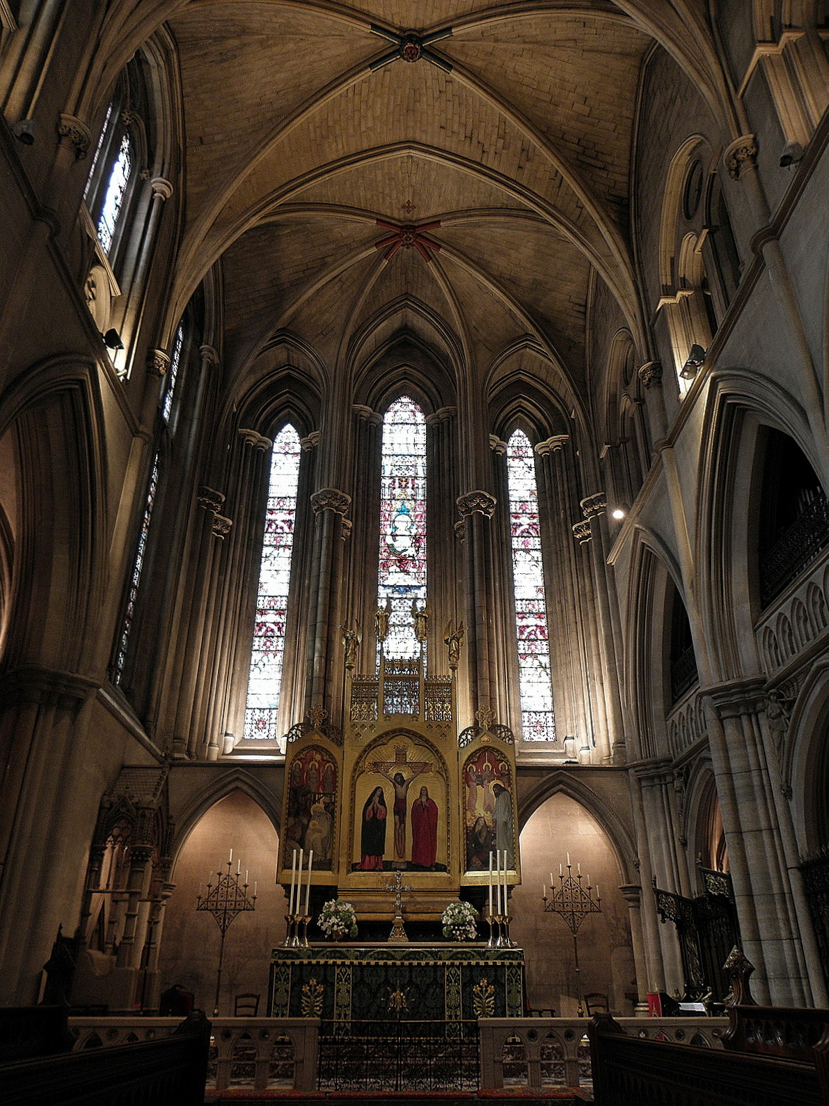 Chœur de la cathédrale américaine de Paris (75).